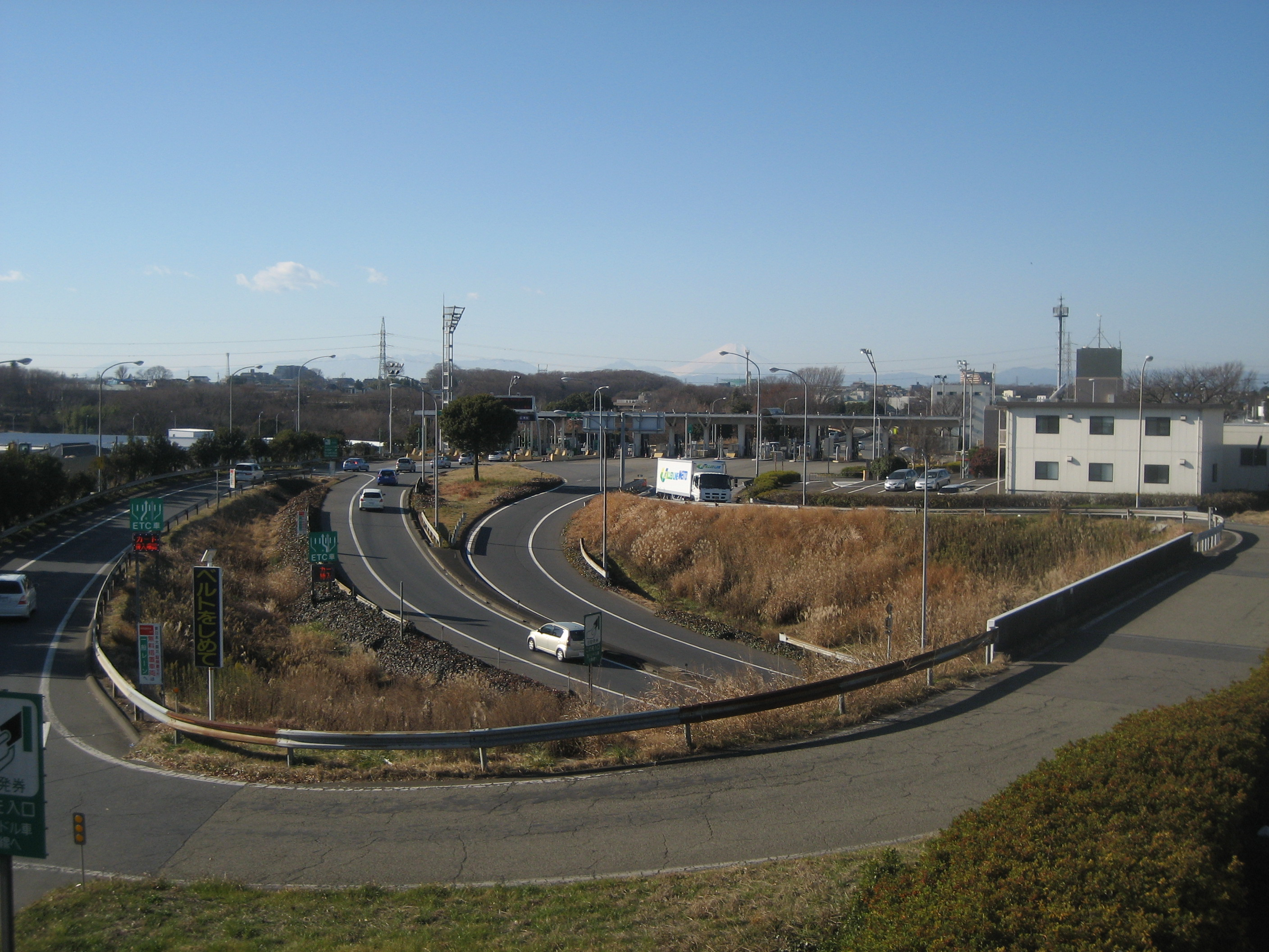 関越自動車道所沢IC料金所（国道463号線歩道橋から撮影）